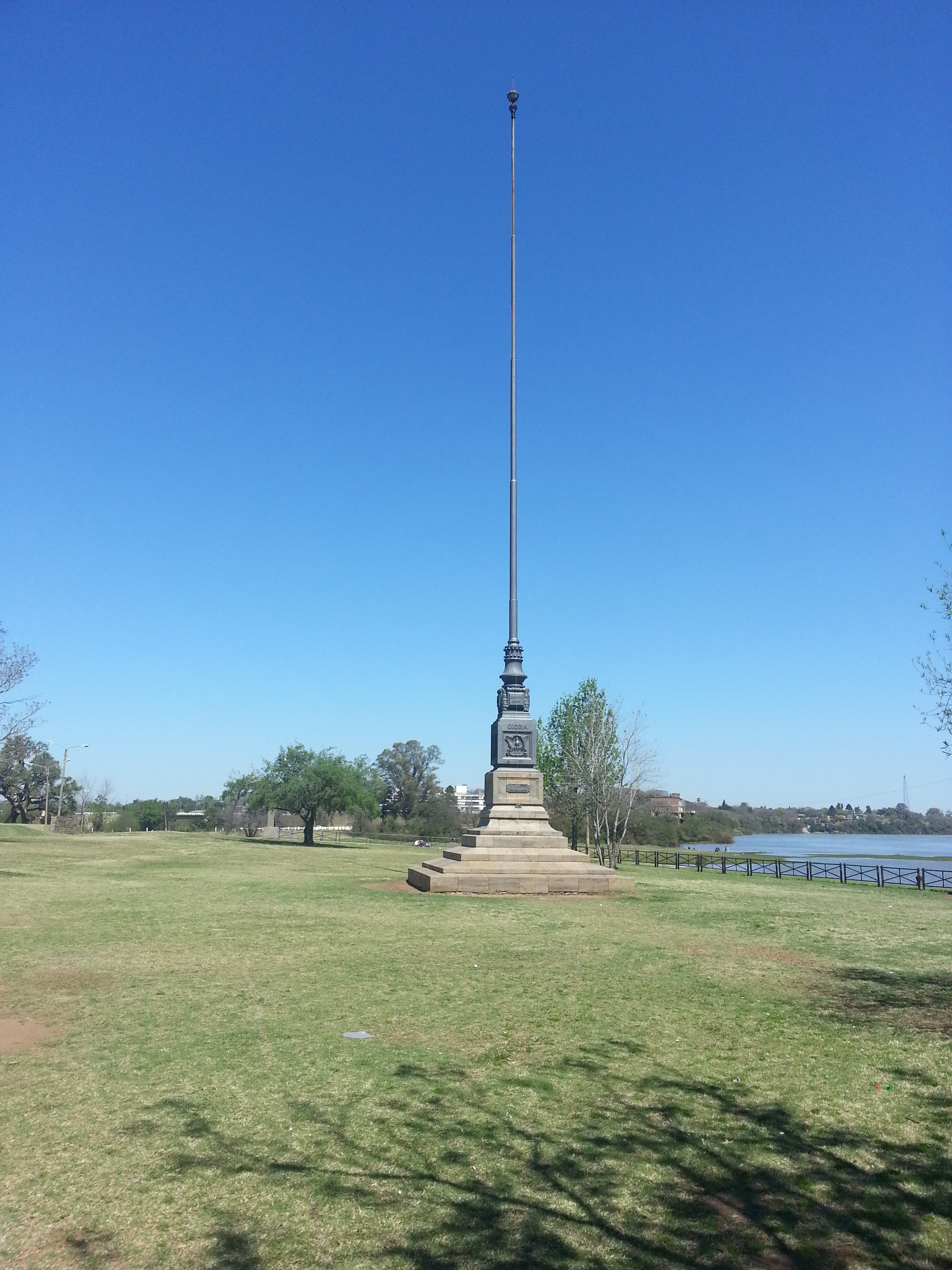 Mástil de Salto. Ubicada en el departamento de Salto